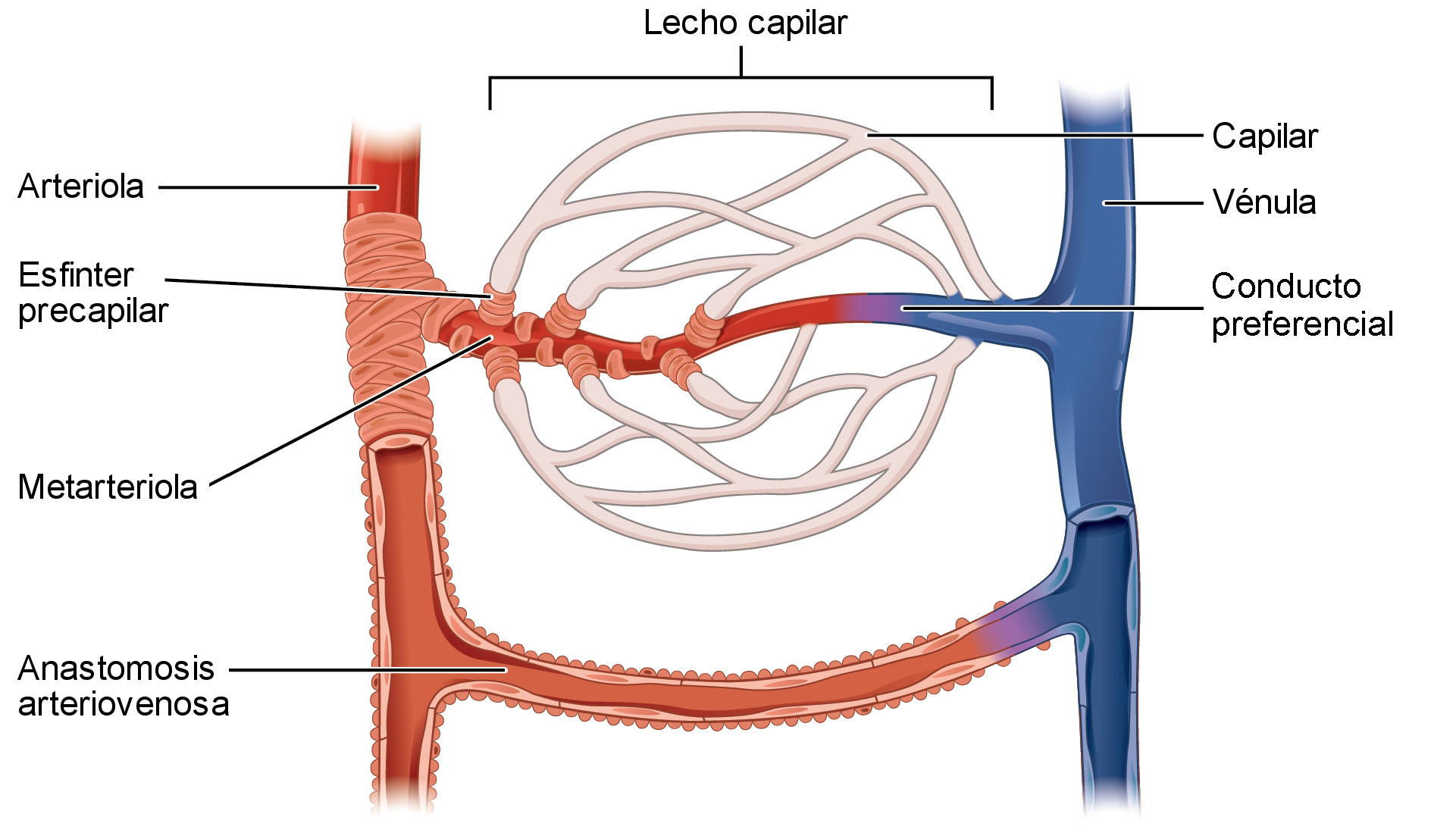 Esquema en el que pueden observarse los capilares sanguíneos, metaarteriolas, arteriolas, vénulas y esfinter precapilar.